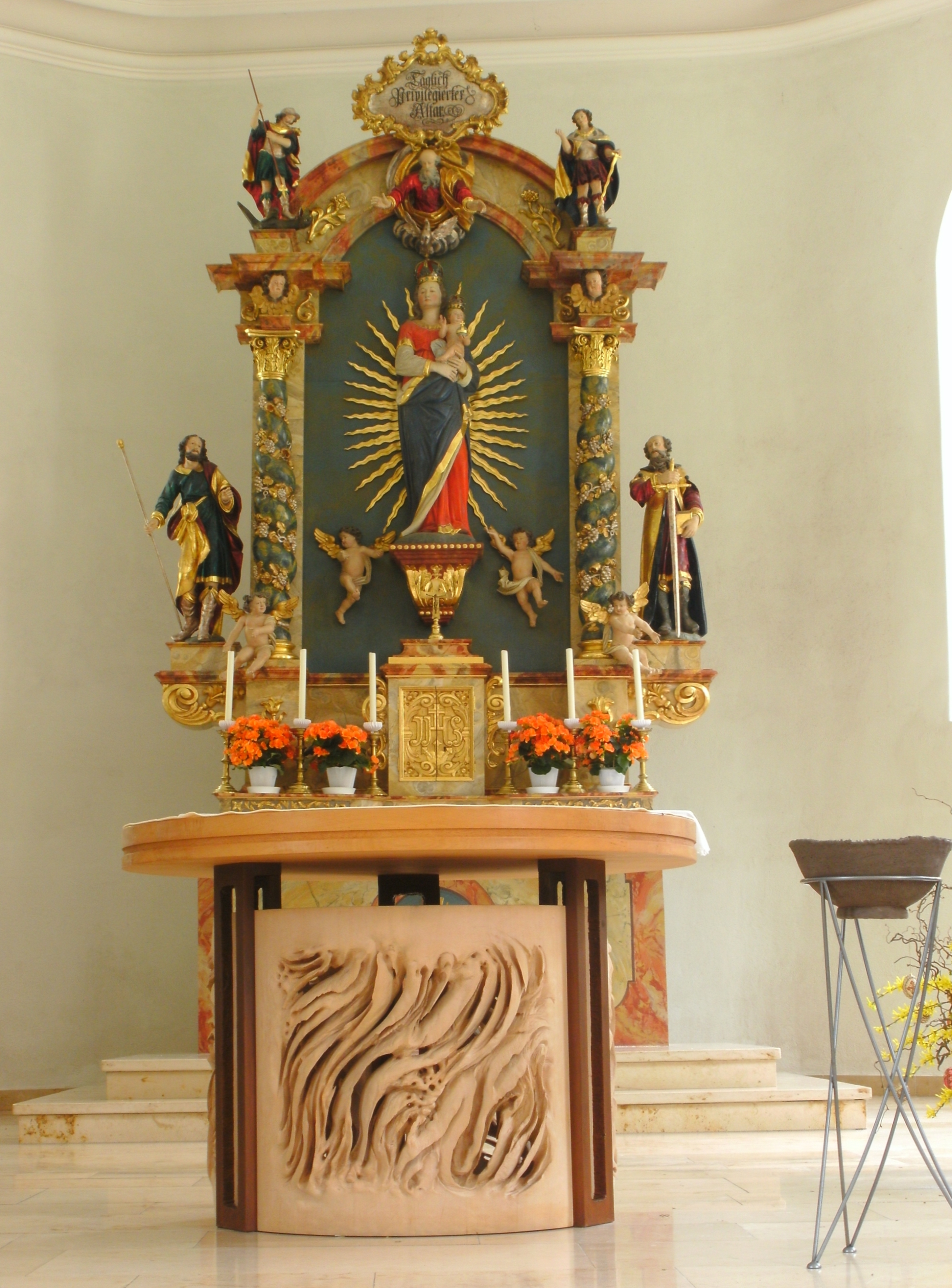 Barocker Hauptaltar der Kapelle „Maria im Buchs“ des ehemaligen Prämonstratenser-Klosters Himmelspforte in Grenzach-Wyhlen, Teilort Wyhlen.